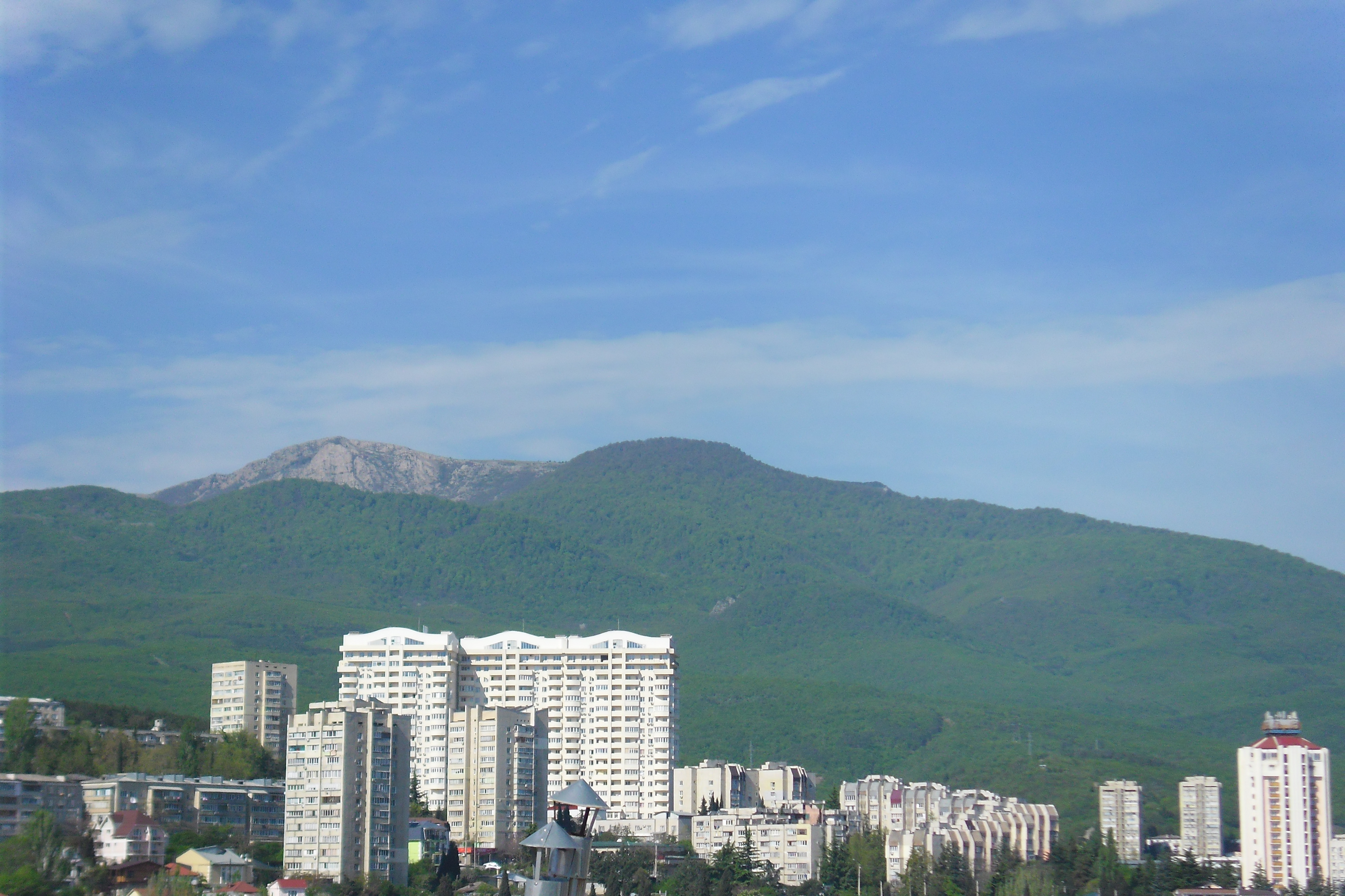 Фото